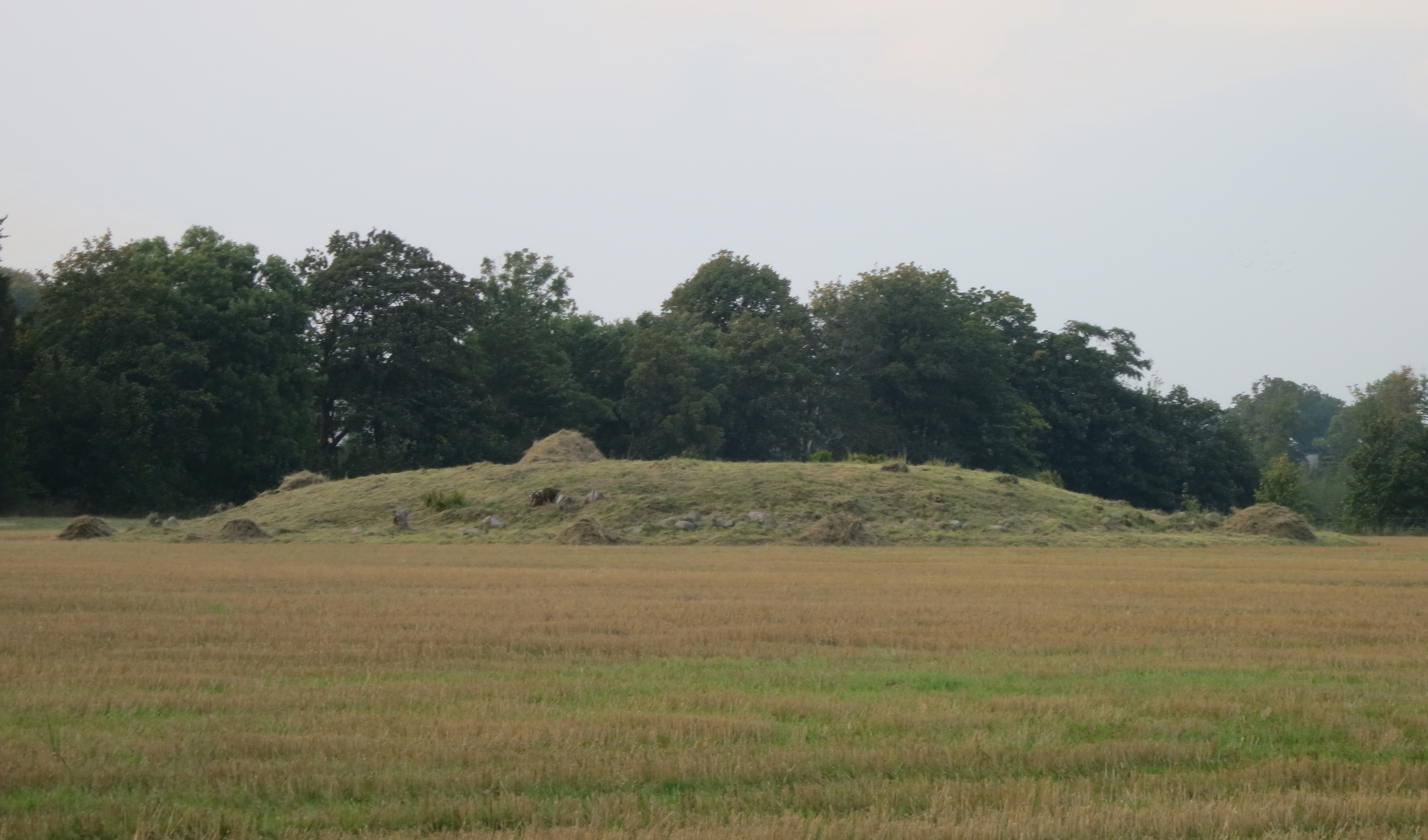 Gravhög (RAÄ-nummer Allerum 15:1) norr om Hittarp i Allerums socken, Helsingborgs kommun, Skåne, Sverige.